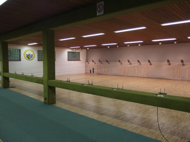 Druckluft Anlage SG Wiesloch